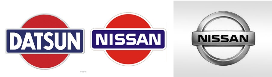 Логотип Nissan сейчас и раньше